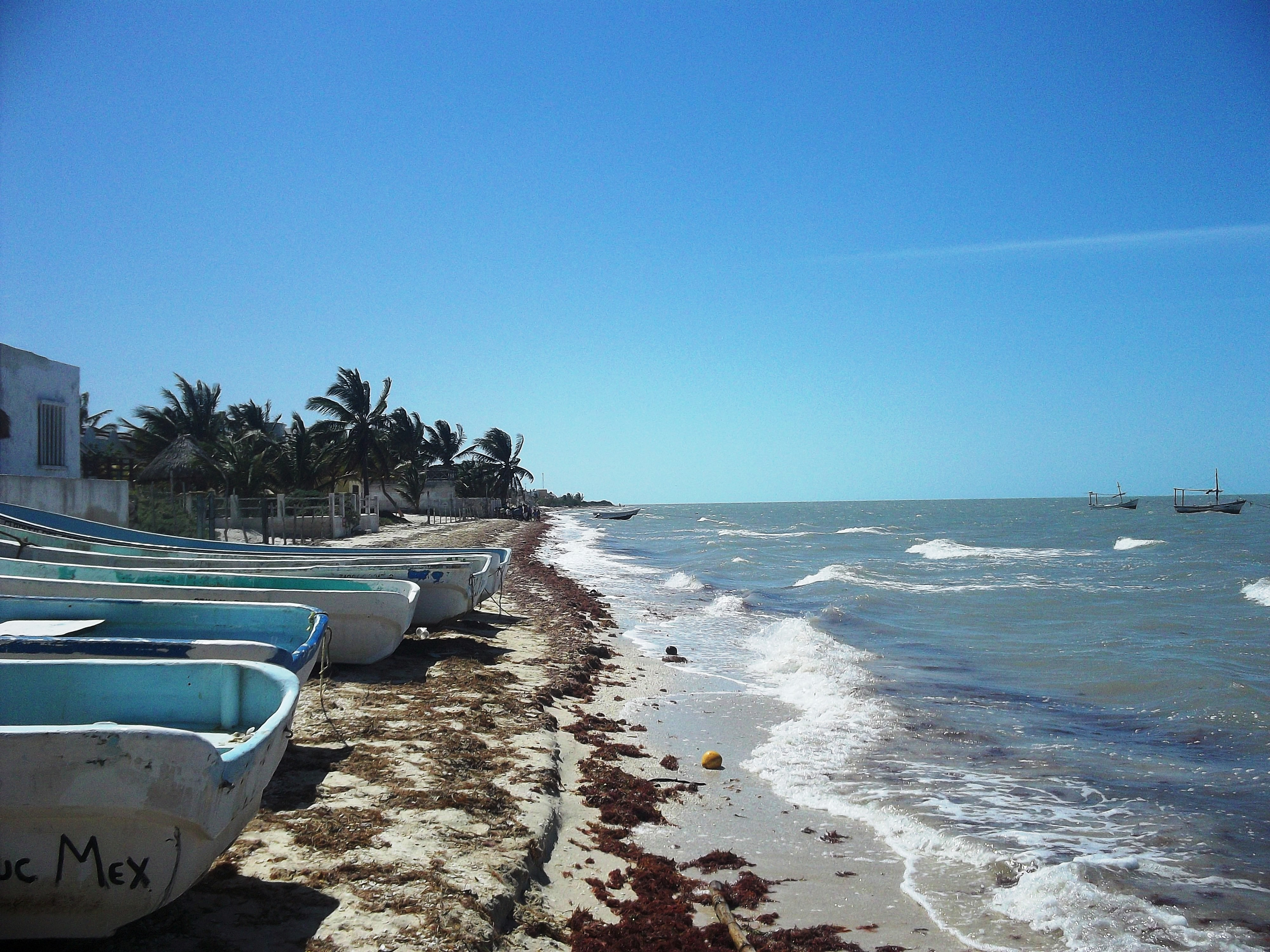 Playas de Santa Clara, Yucatán.